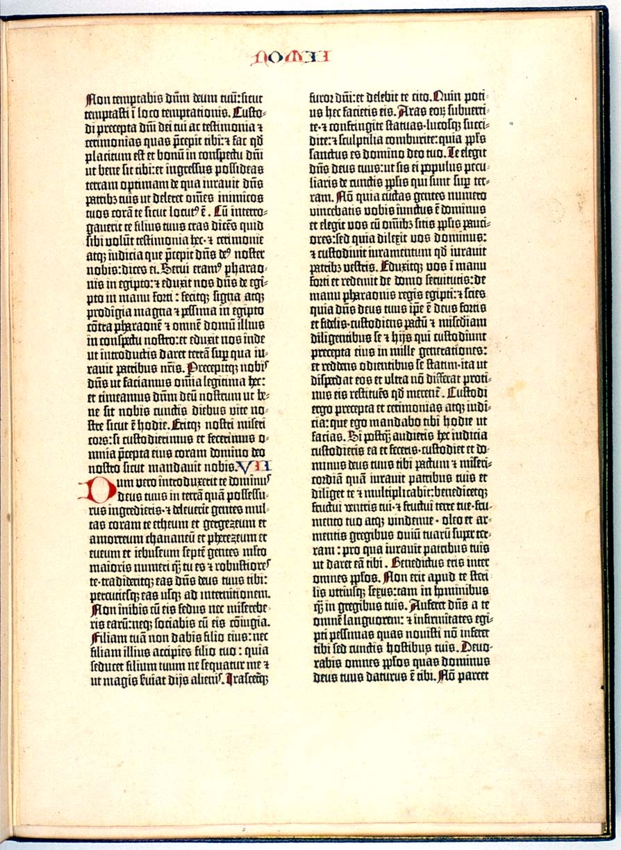 Bible de Gutenberg Deuteronomy 6:16-7:16